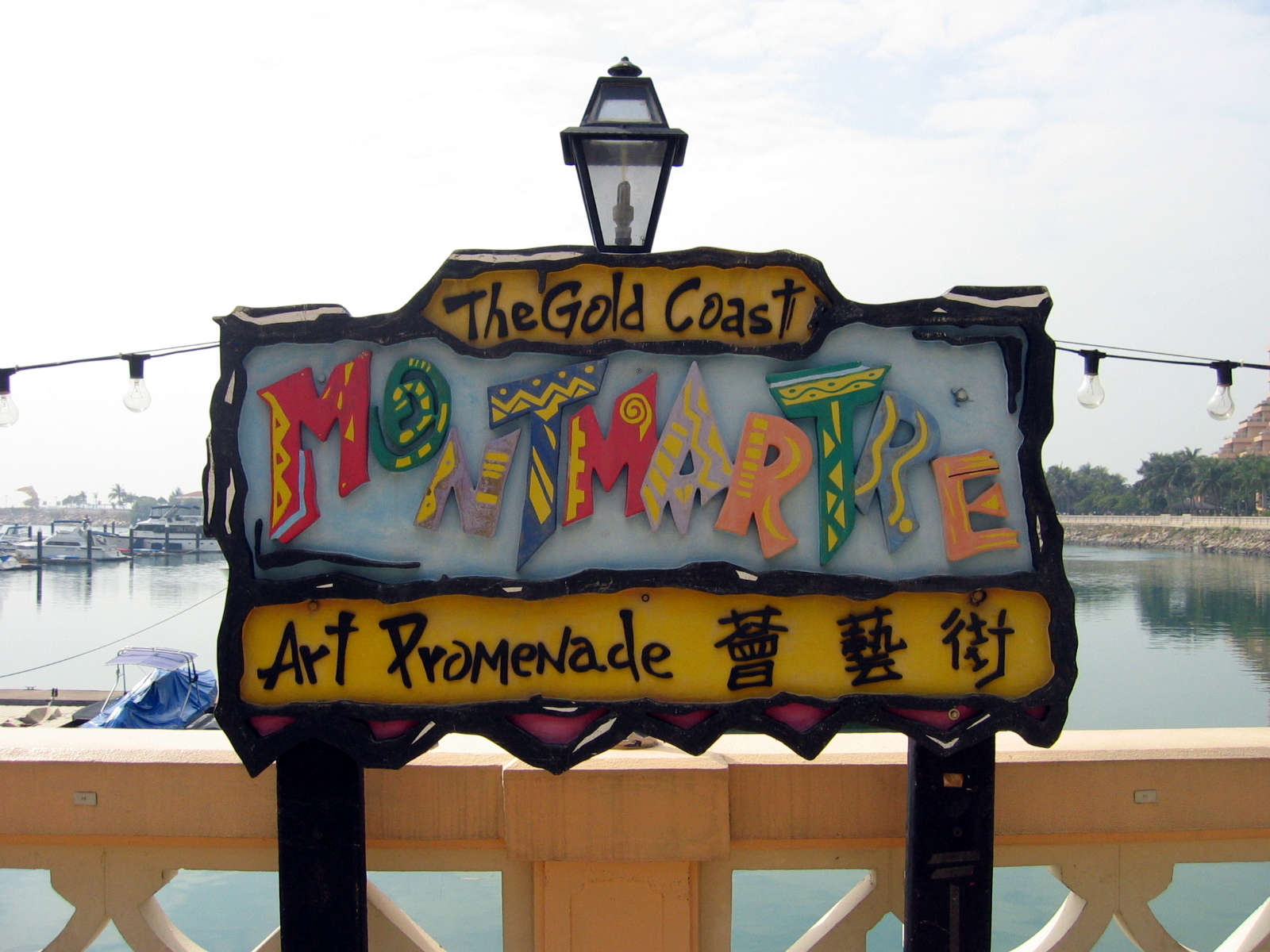 Gold Coast Piazza Montmartre Stall